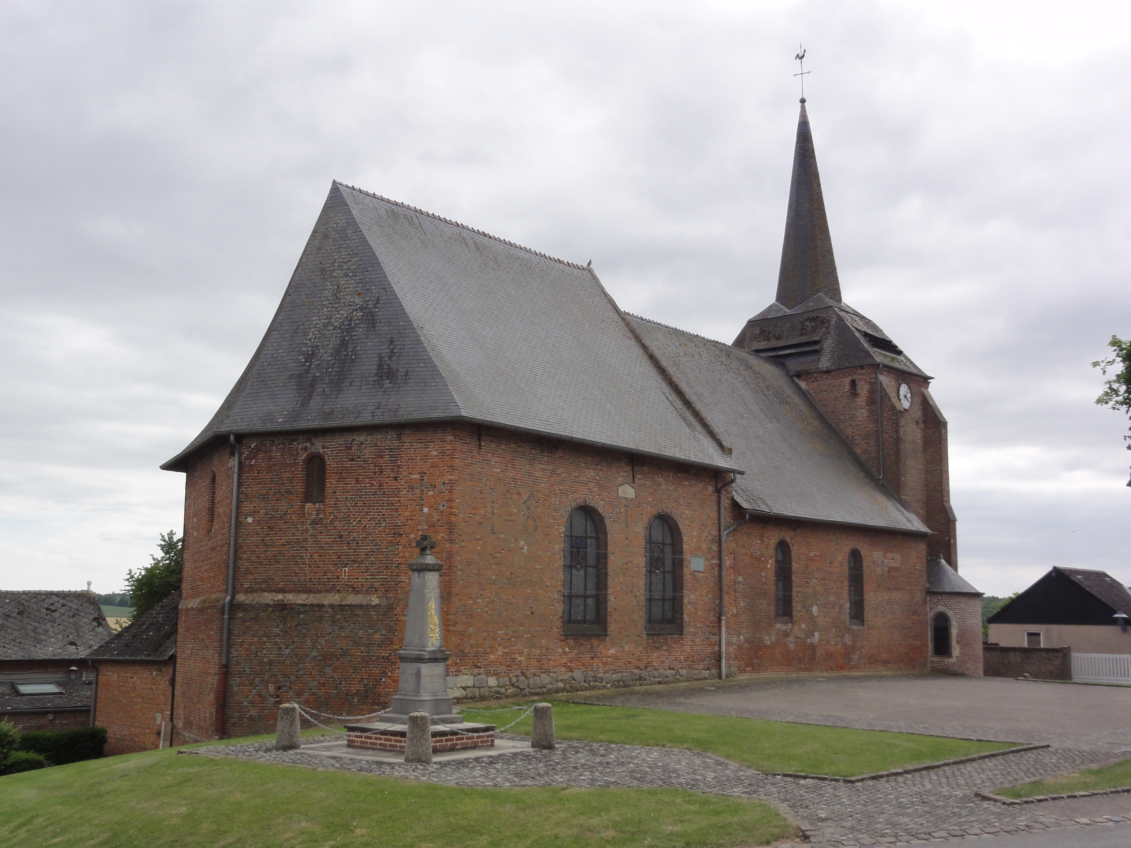 Harcigny (Aisne) église